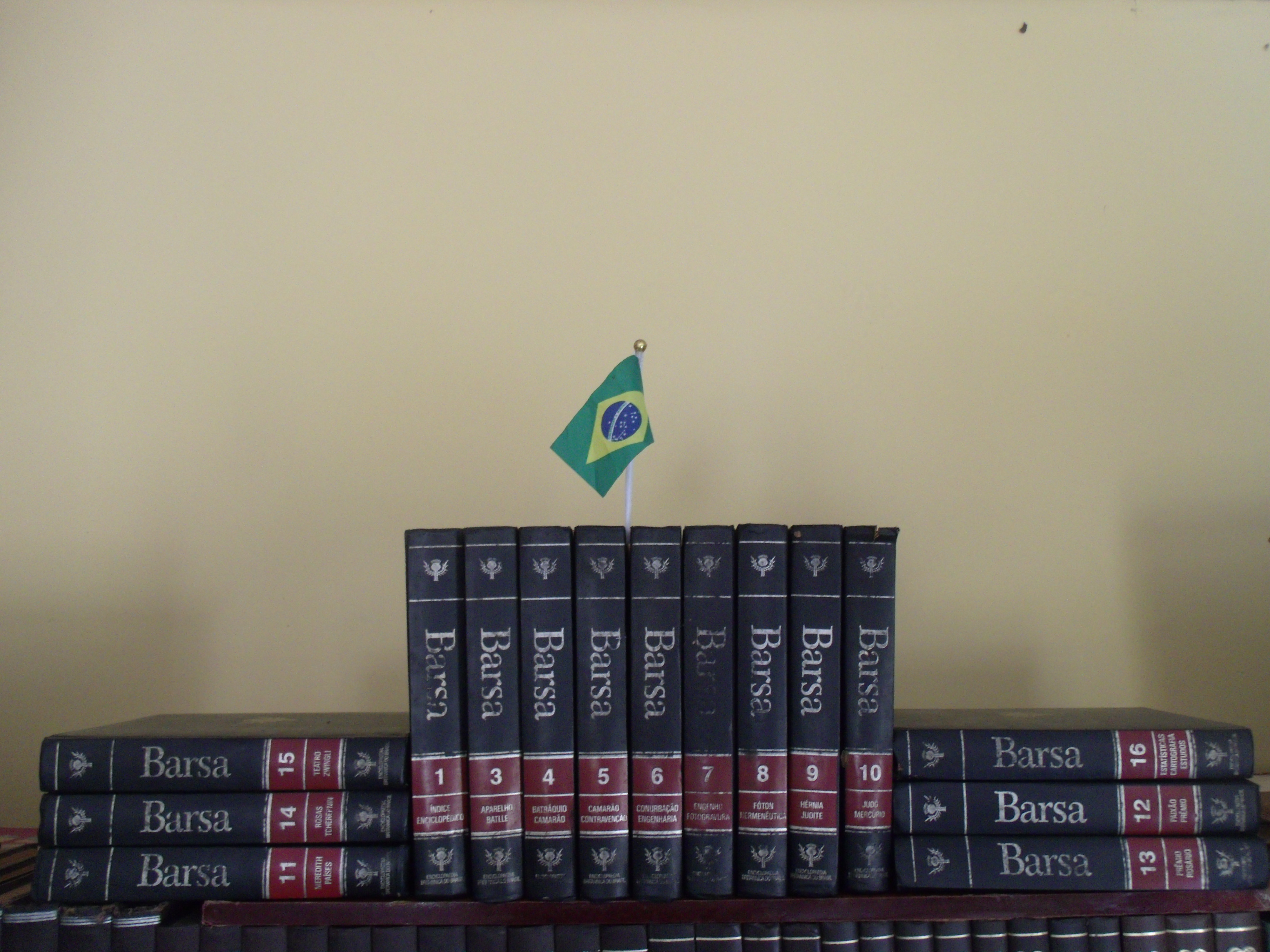 Coleção incompleta da Enciclopédia Barsa, edição brasileira.